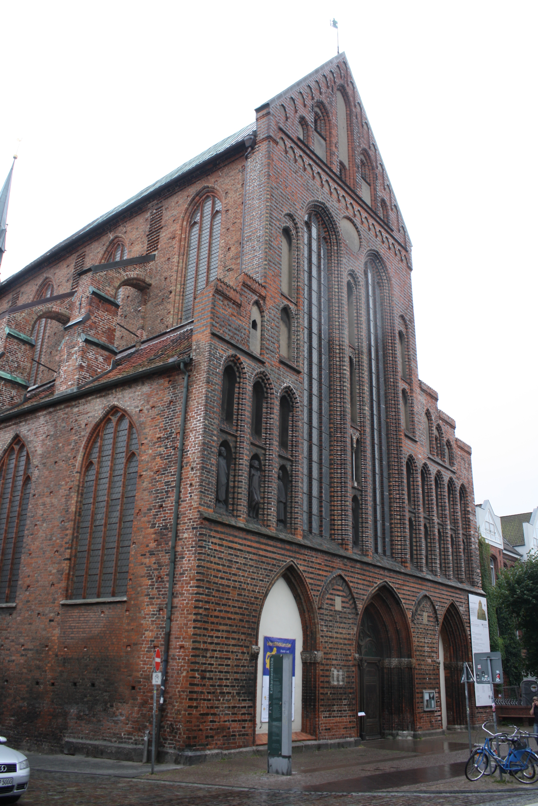 Katharinenkirche